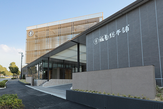 坂角総本舖本社棟